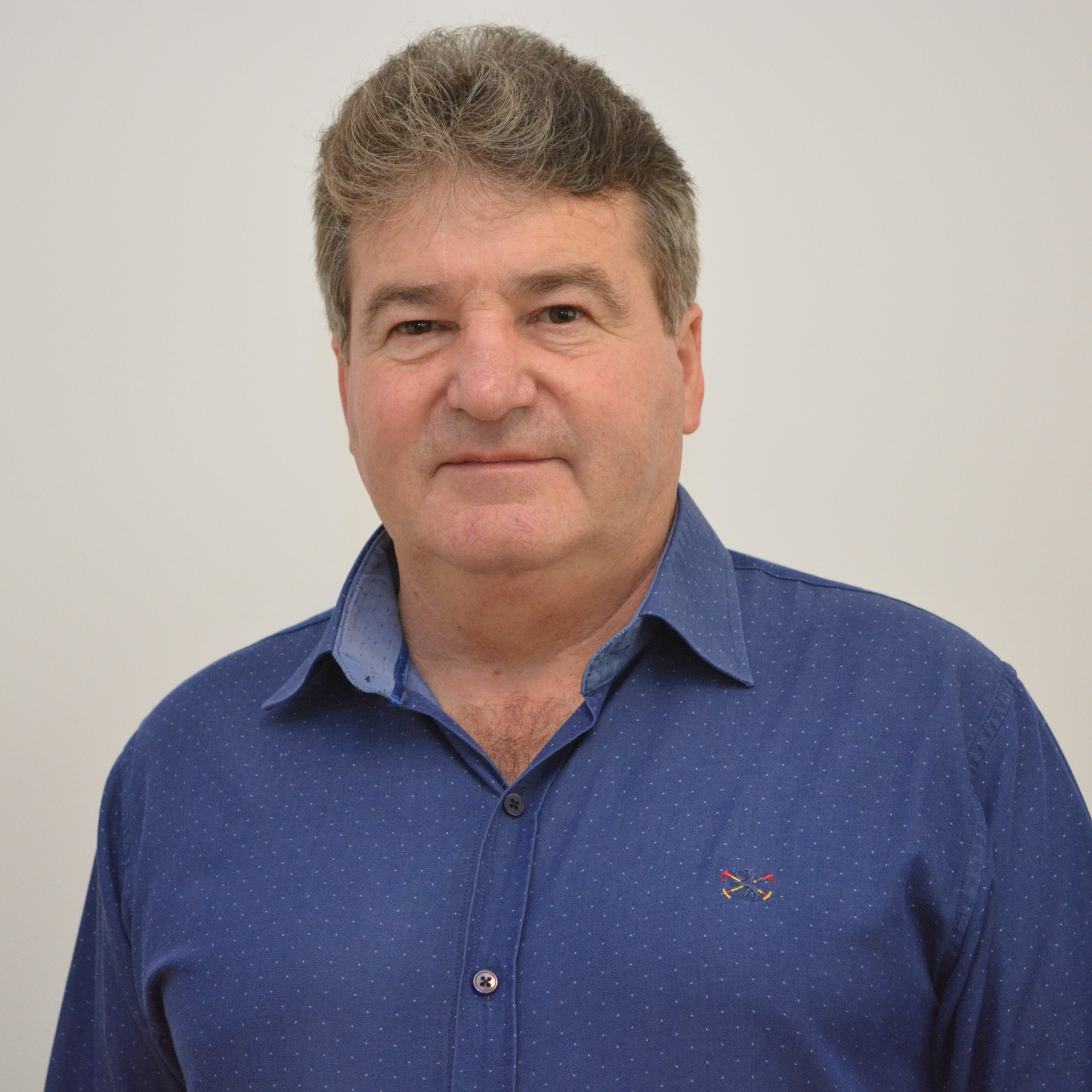 Professor Rubens Ferronato